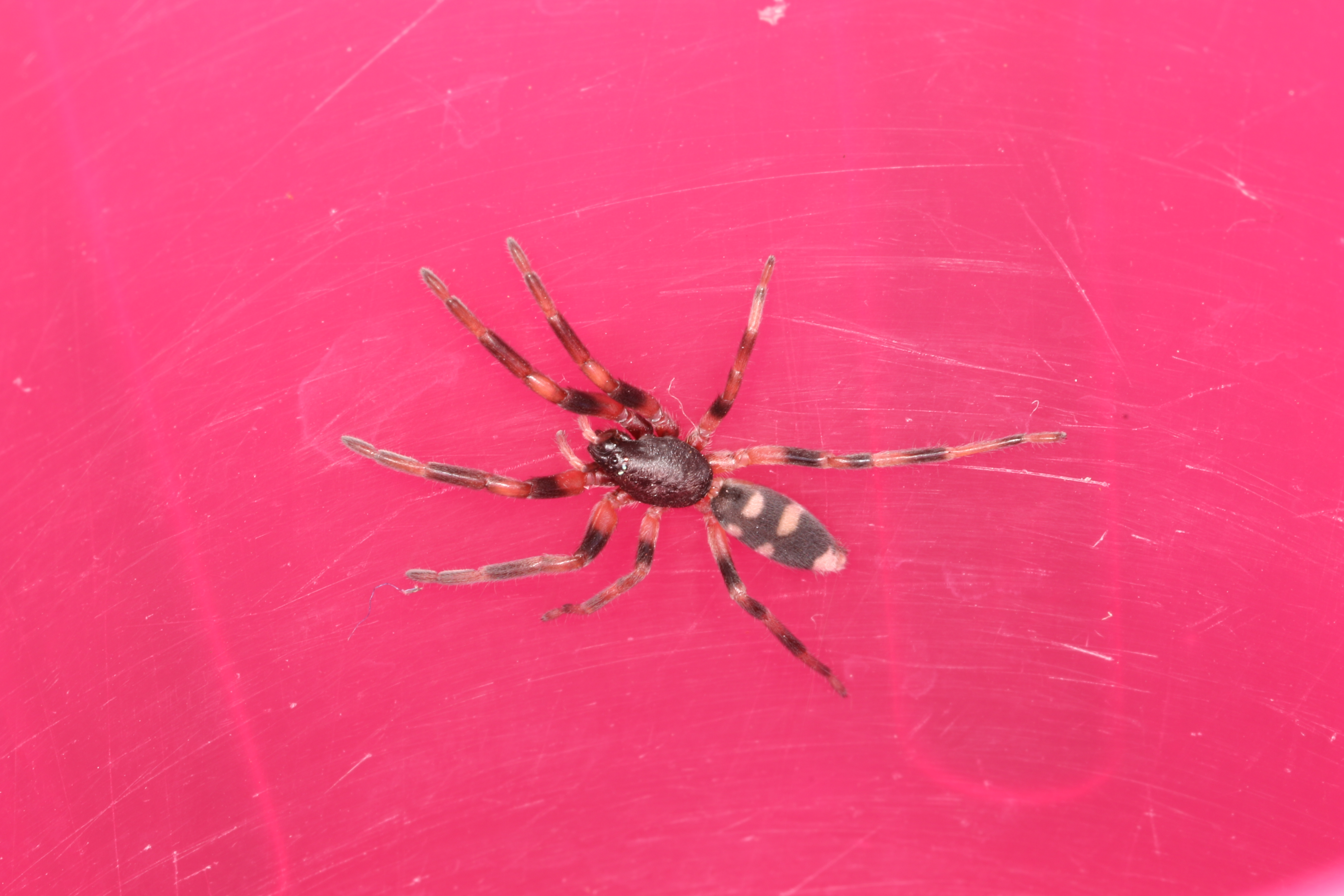 Lampona murina (Platnick), Aranda, ACT, 31 December 2015